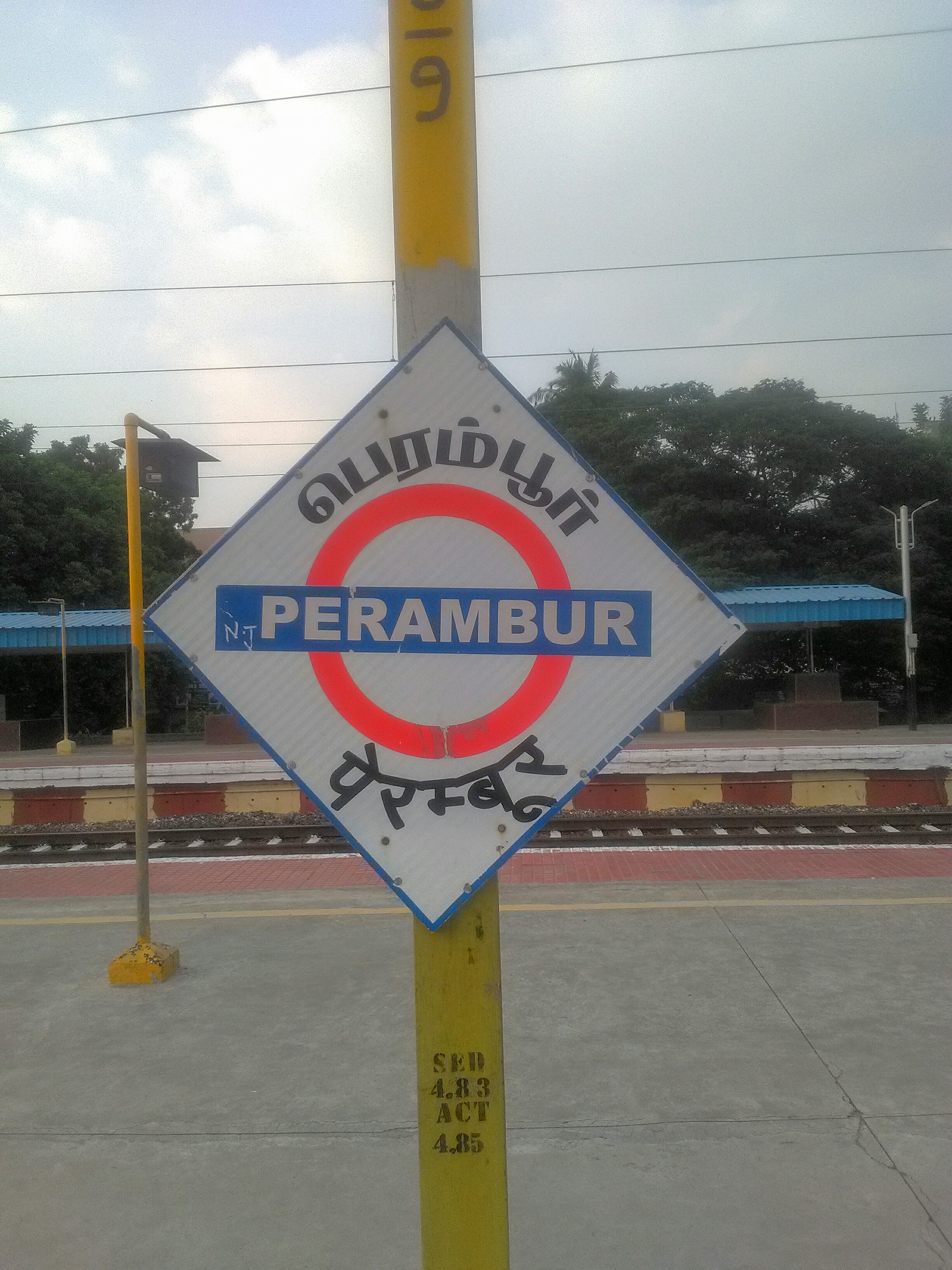 பெரம்பூர் இரயில் நிலையத்தில் எடுக்கப்பட்ட புகைப்படம் ...